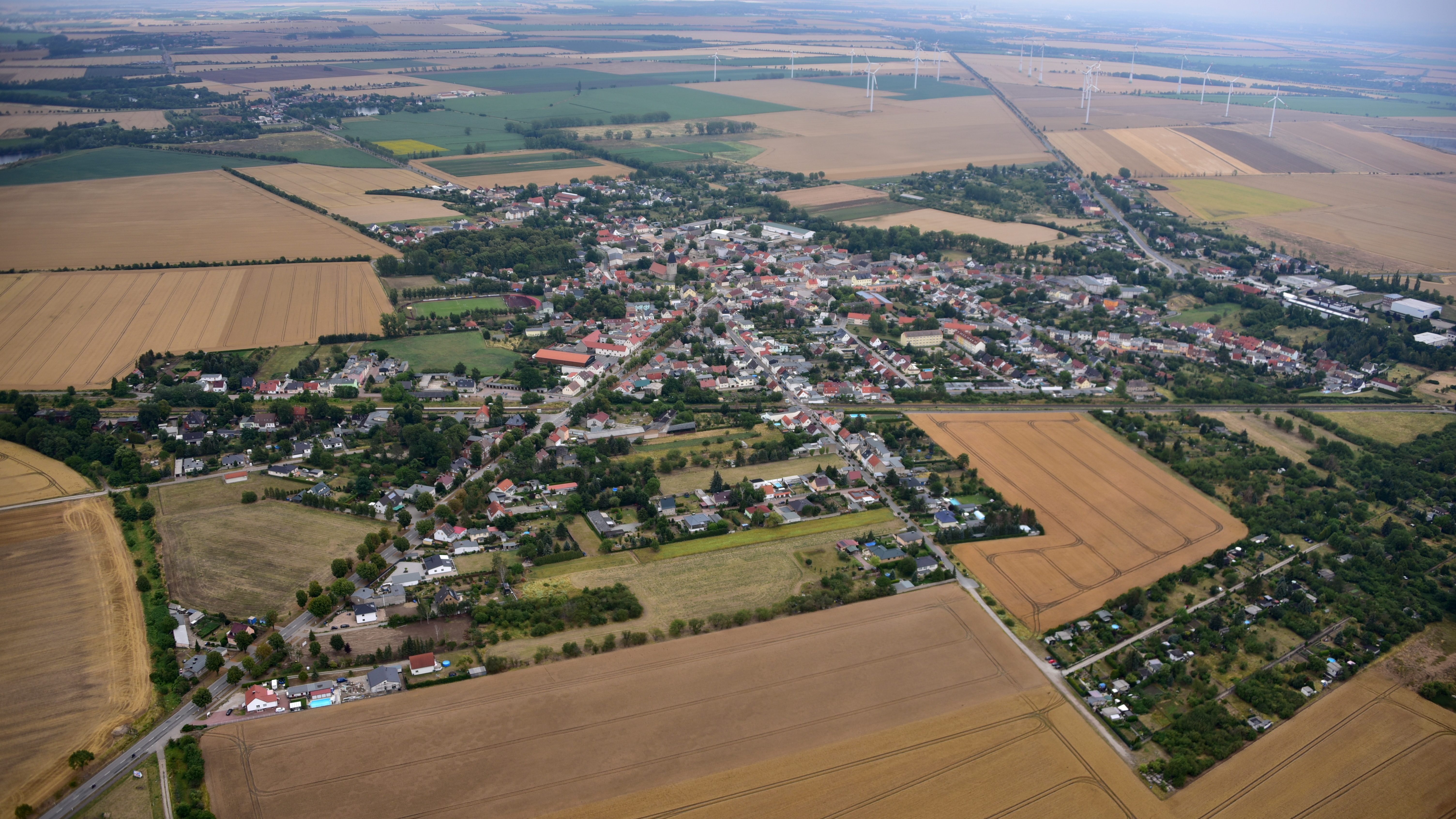 Förderstedt, Luftaufnahme (2019)